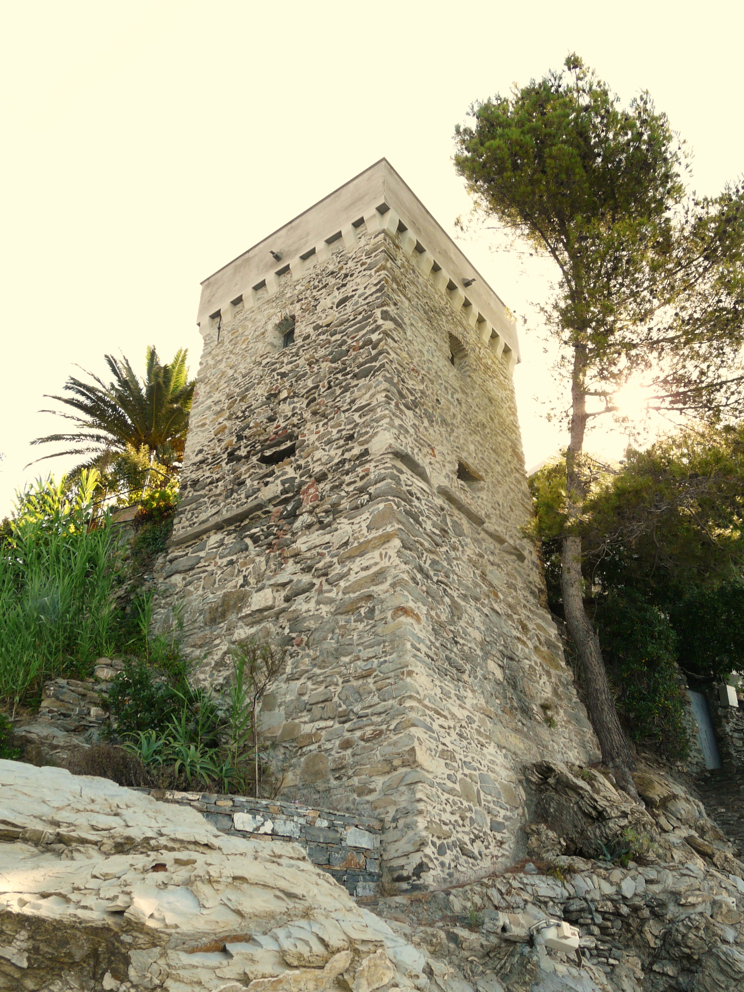 Torre di Levante, Zoagli, Liguria, Italia